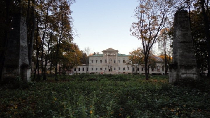 Парадный фасад усадьбы Степановское-Волосово, 2010 год